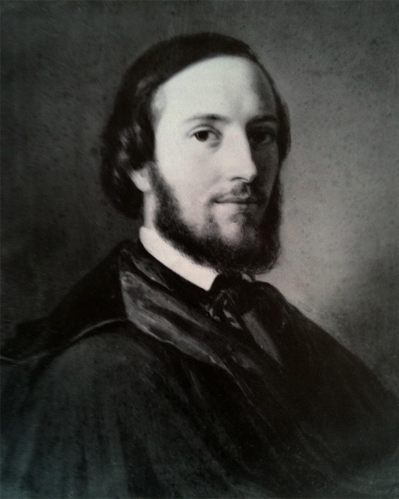 Ein Porträt von Johann Friedrich Voltz